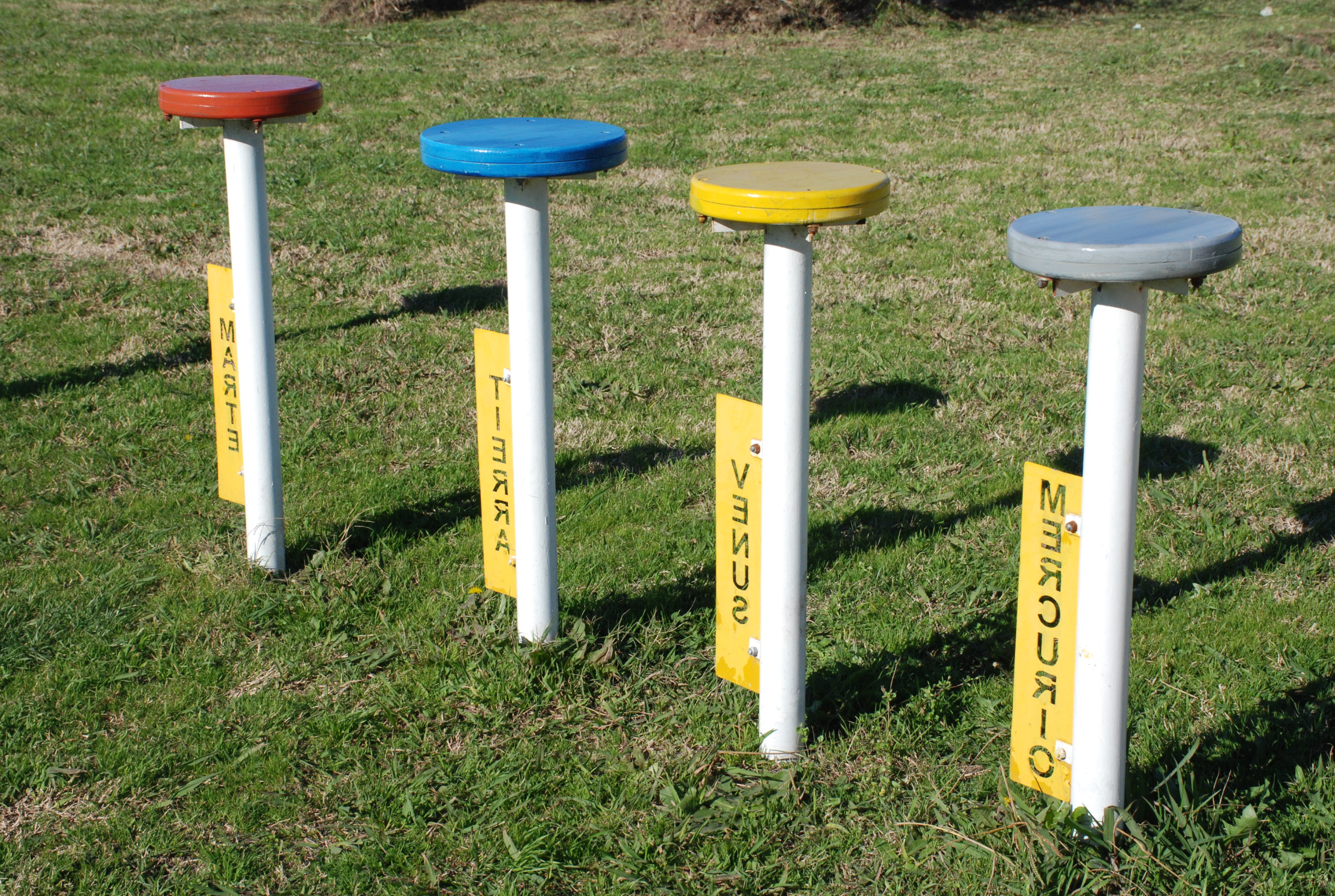 Escala planetaria del Parque Cielos del Sur, Chivilcoy, provincia de Buenos Aires.